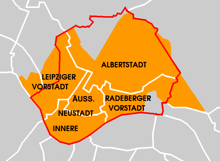 Stadt Dresden, Gemarkung Neustadt (orange) mit den Grenzen des Ortsamtsbereichs Neustadt (rot) und der statistischen Stadtteile (weiß) sowie mit den Stadtteilnamen